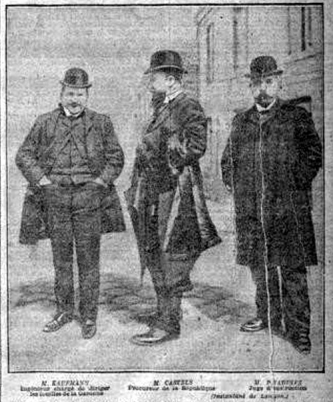 Crime de Langon - MM Kaufmann - Castels - Pradines